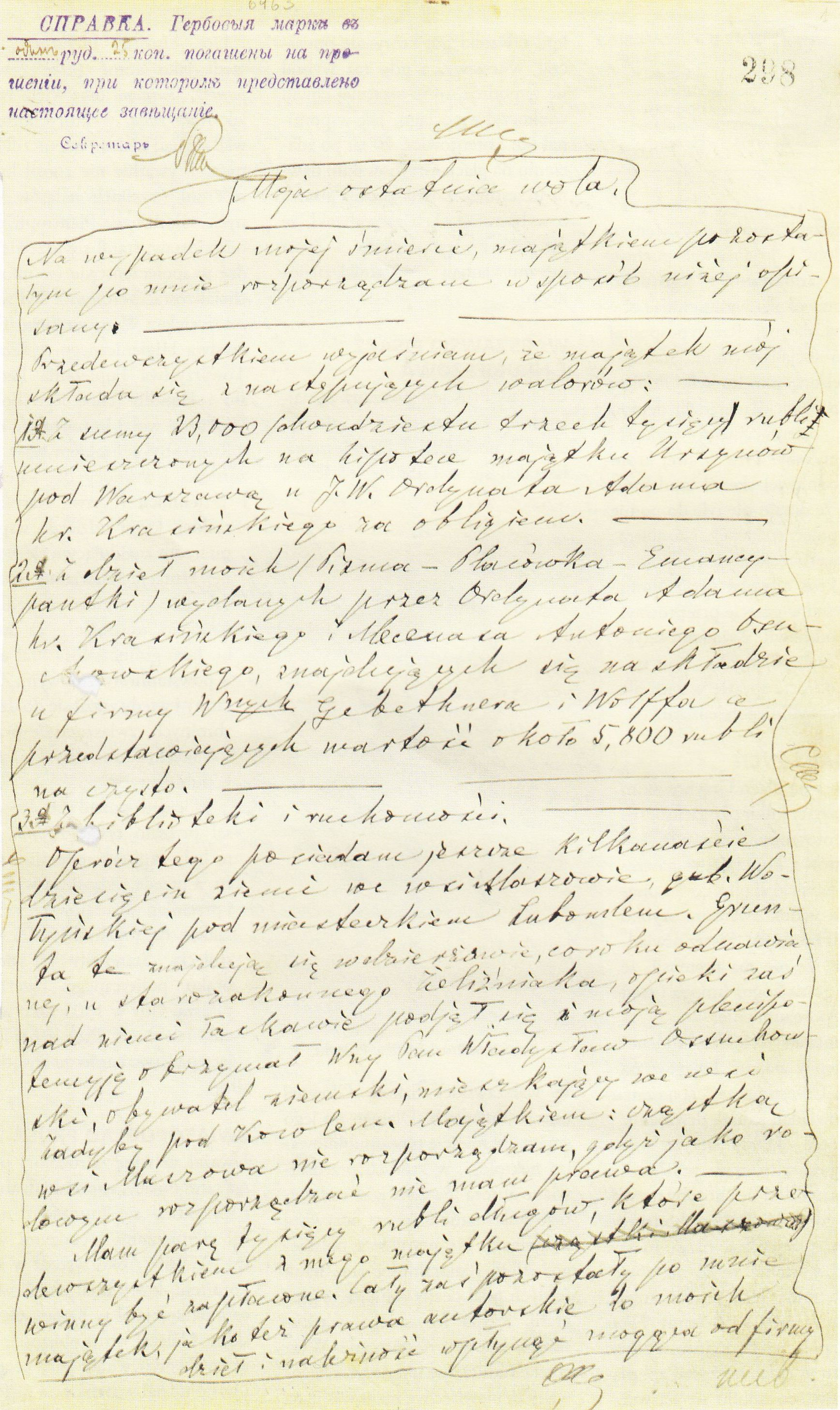 Testament Aleksandra Głowackiego (Bolesława Prusa)